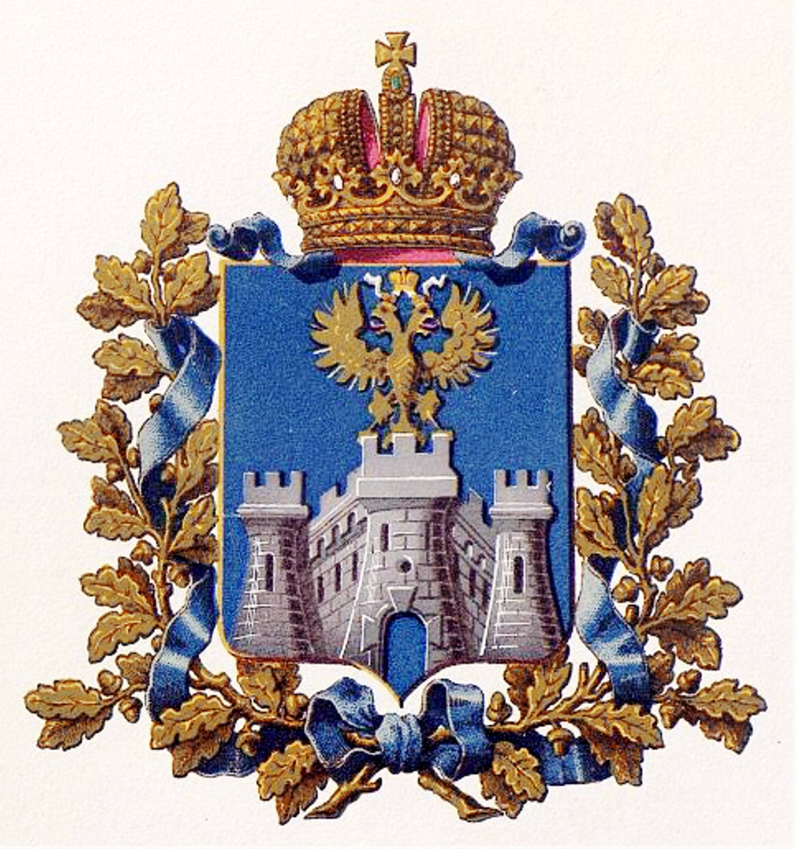 Official Russian Empire coat of arms Orel Governorate. Гласный герб Российской Империи Орловской губернии в Гербовнике Бенке. Утверждён Императором Всероссийским Александром Вторым в 1878 году.